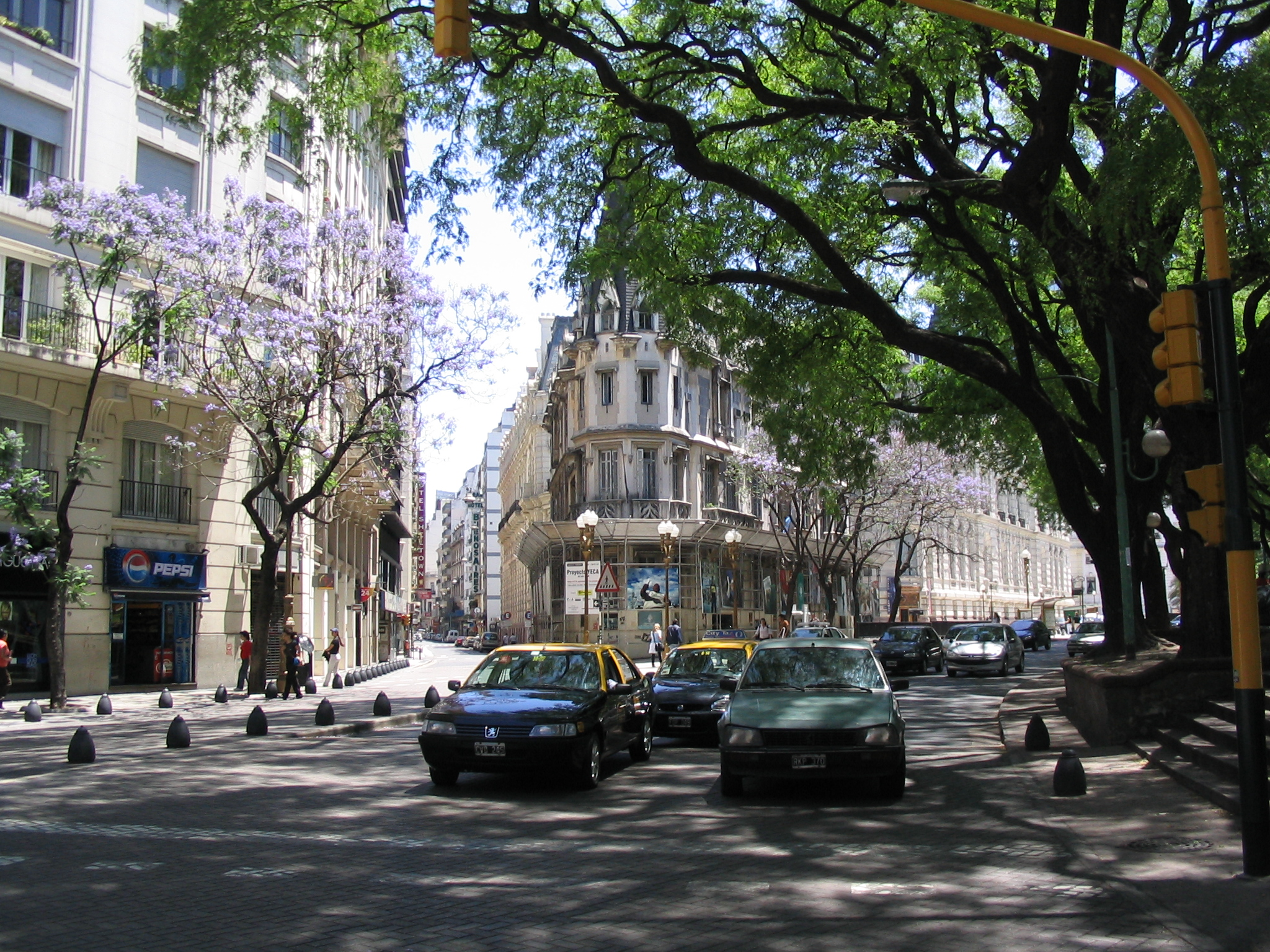 Avenida Santa Fe y Marcelo T. de Alvear, Retiro, Buenos Aires, Argentina.